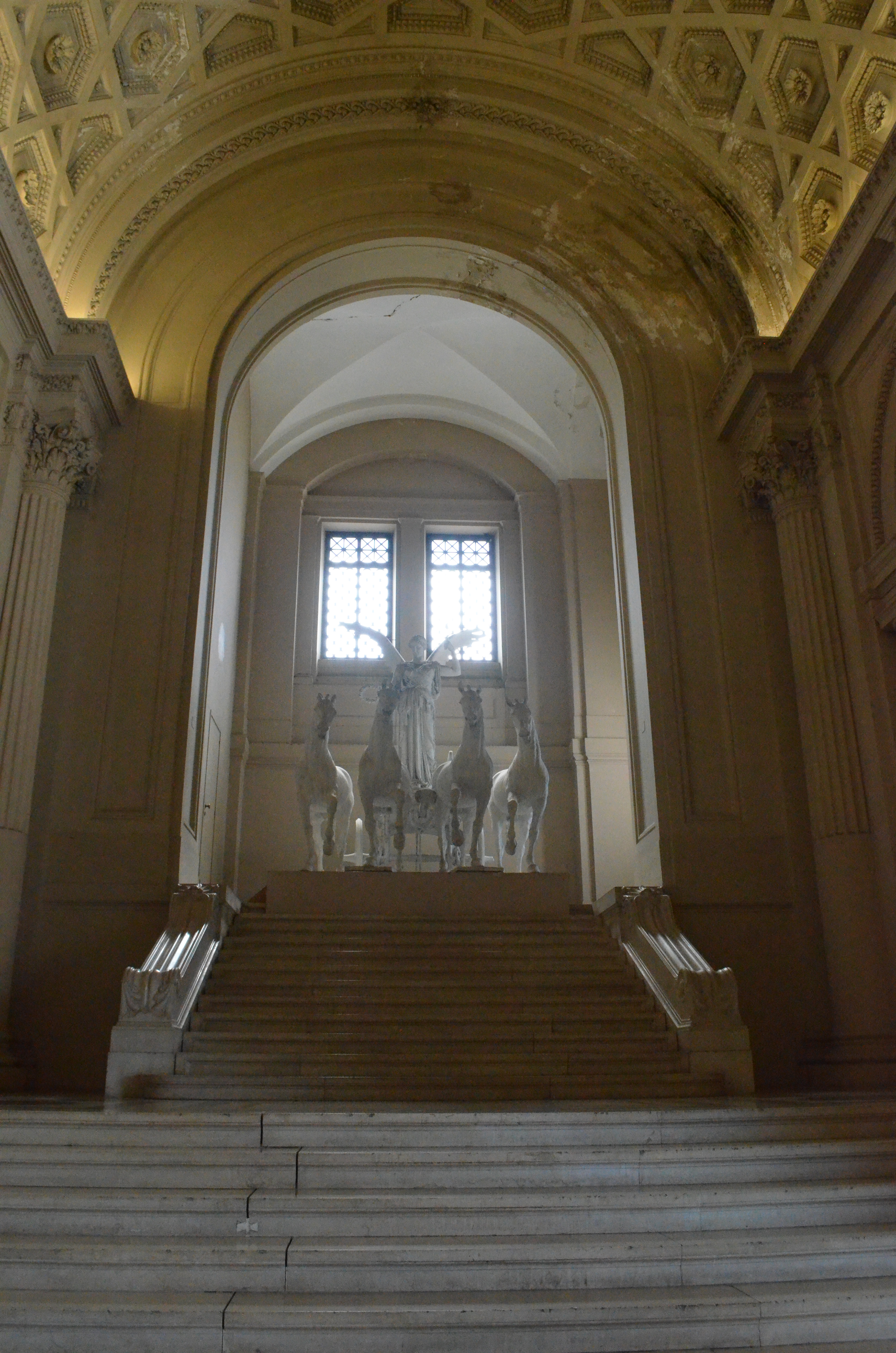 Altare della Patria